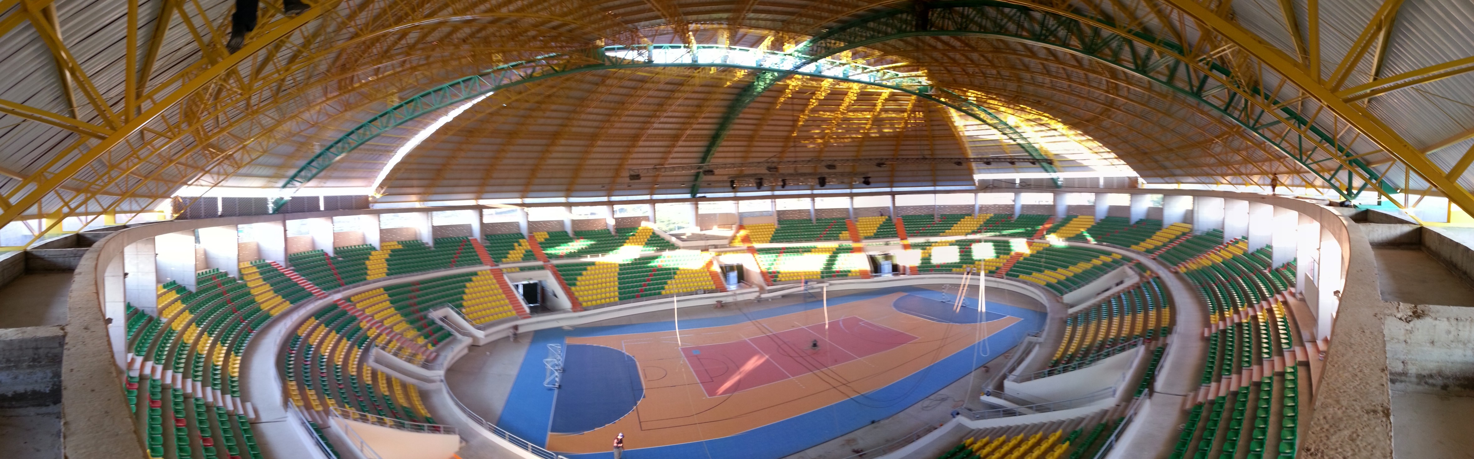 Puerto Maldonado, Peru